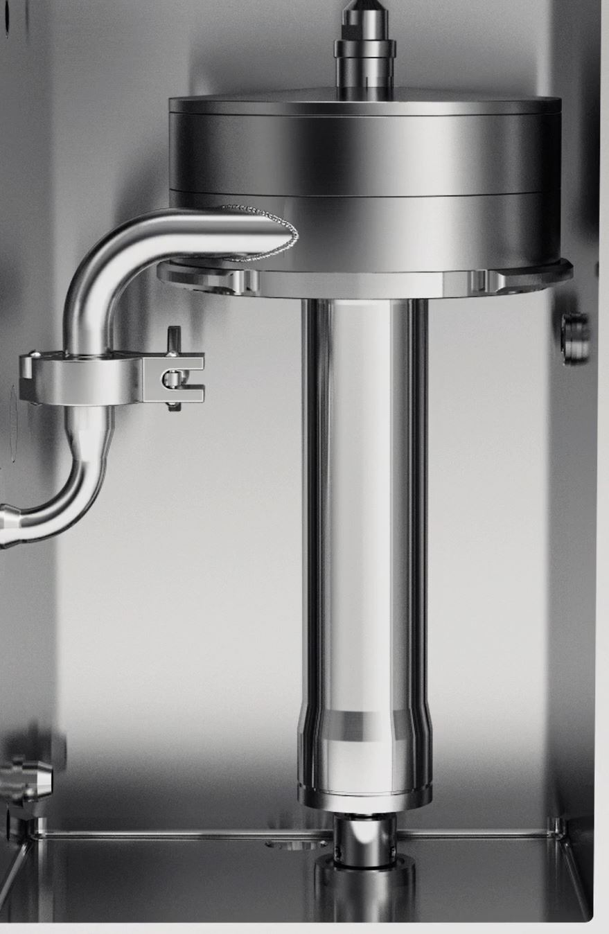 Blick in die Röhrenzentrifuge CEPA LE GP